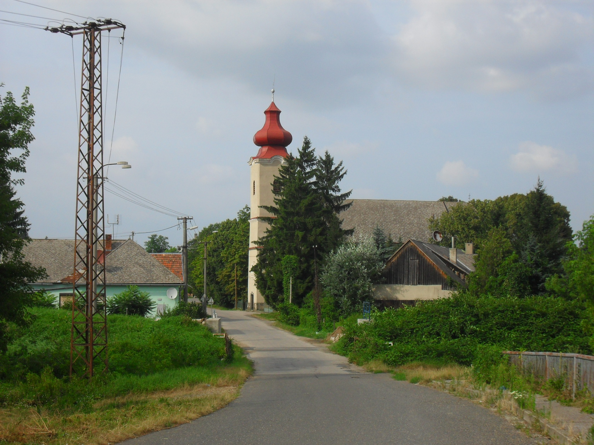 Ipolyvisk - utcakép